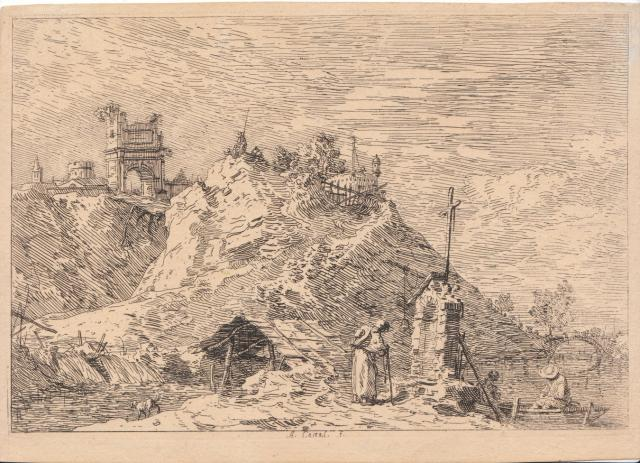 Giovanni Antonio Canal detto Il Canaletto (Venezia 1697 – ivi 1768) Paesaggio con pellegrino in preghiera Acquaforte misure lastra mm 142 × 210, foglio mm 217 × 152 Pittore disegnatore e incisore, è considerato il più importante vedutista veneziano di tutti i tempi. Viene inizialmente avviato dal padre alla professione di scenografo. Nel 1719 si stabilisce a Roma per due anni subendo l’influenza Gaspar Van Wittel e realizzando diversi disegni con vedute romane. Una volta tornato a Venezia prende contatto con il mercante-collezionista Joseph Smith. Tra i due nascerà un proficuo rapporto professionale. La fama di Canaletto crescerà notevolmente negli anni successivi, guadagnando grande stima soprattutto da parte dei collezionisti stranieri residenti a Venezia. Tutte le incisioni di Canaletto sono realizzate tra il 1741 e il 1744. La serie viene intitolata “Le Vedute altre prese da i luoghi altre ideate”, ed è composta da una trentina di acqueforti. Successivamente alcune lastre, che erano state lavorate in modo da riportare più composizioni sullo stesso supporto, vengono tagliate, aumentando il numero della serie. La prima edizione viene eseguita nel 1752. Nel ’46 l’artista raggiunge Londra, ove risiederà per ben dieci anni prima del ritorno definitivo nella Serenissima. Nelle sue incisioni Canaletto riesce attraverso un attento uso del tratteggio a creare eccellenti effetti luministici. Impressione eccellente, nitida e ricca di toni nell’unico stato. Esemplare in tiratura postuma remondiniana collocabile tra il 1772 e il 1799. Firma in lastra in basso al centro “A. Canal. f.” Perfetto stato di conservazione. Margini da 3 a 8 mm. Bibliografia: Bromberg, 27; Montecuccoli, 23. Scheda tecnica di Matteo Crespi, Il bulino antiche stampe Milano, 2012.